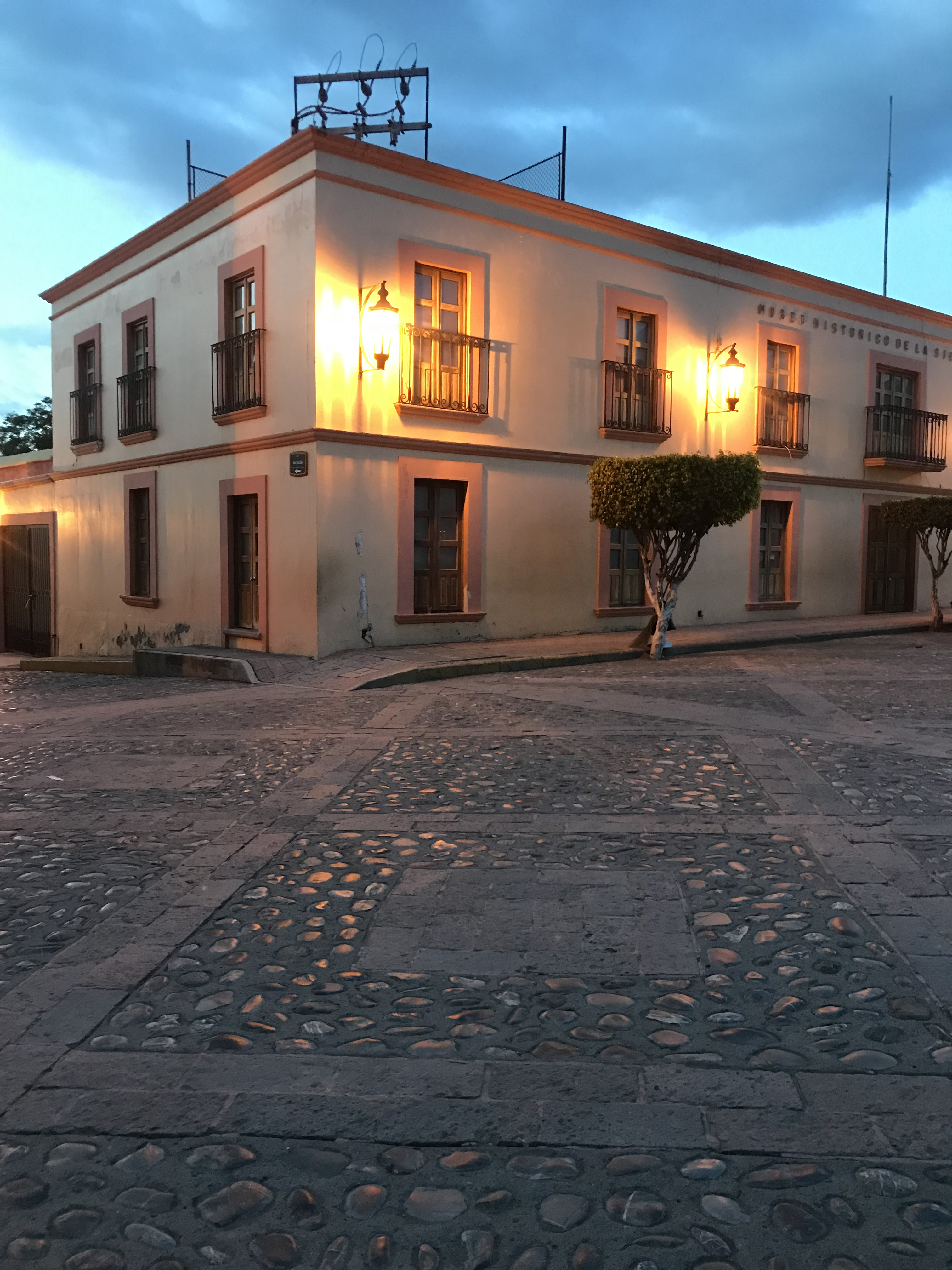 Vista noctura de la fachada del Museo Histórico de la Sierra Gorda.